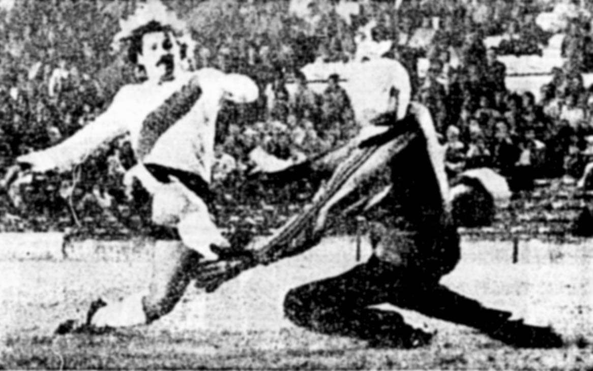 Oscar Trossero convierte el primer tanto de River ante Rácing. Carlos Rodríguez no puede evitarlo con su salida. Finalmente empataron dos a dos